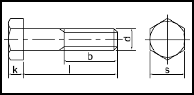 Stålbolt ISO 4014